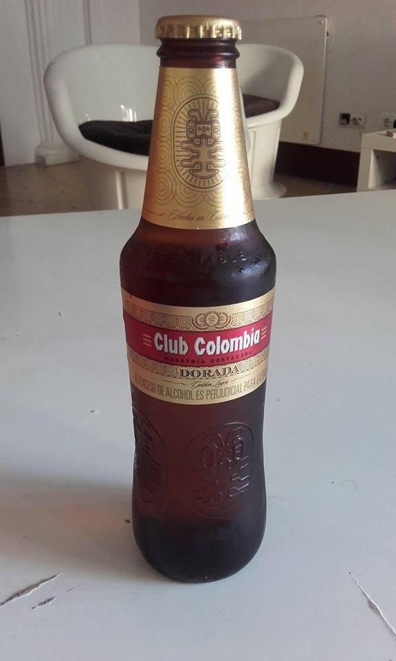 Botella de cervexa Club Colombia